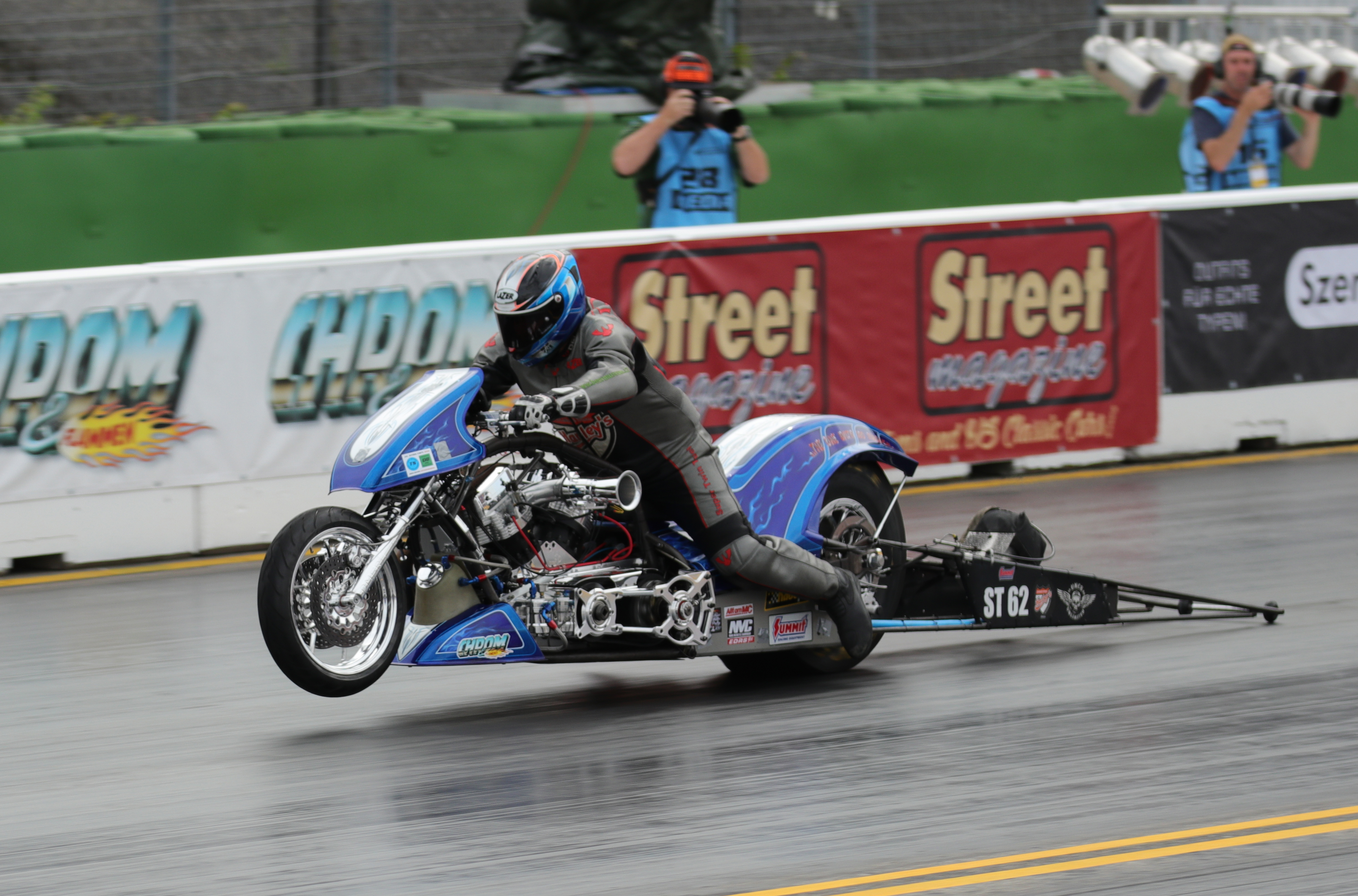 Startendes Super Twin Top Fuel Bike (STTF) Roman Sixta (CZE) Nitrolympx 2019